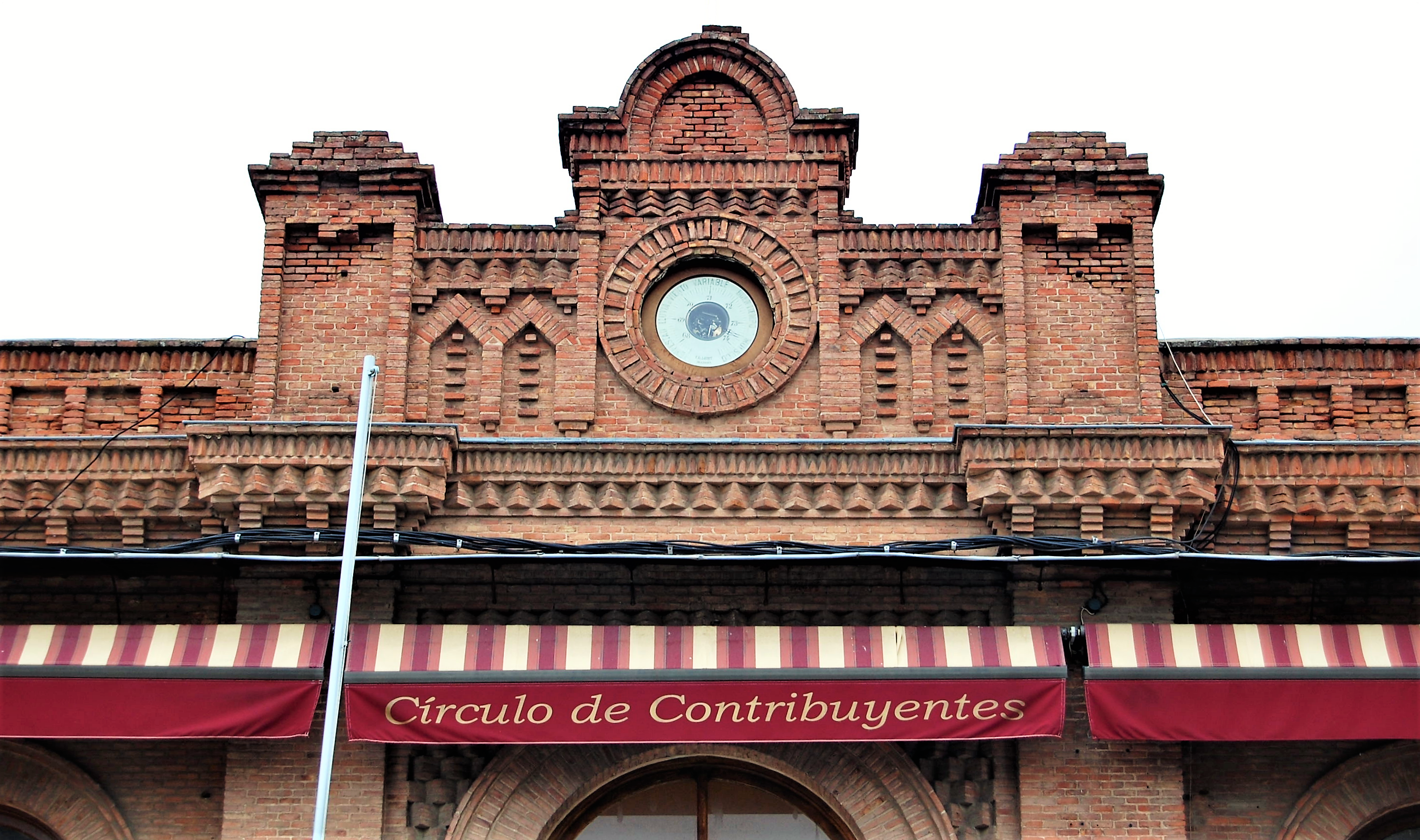 Barómetro aneroide instalado en el frontón de la fachada del Círculo de Contribuyentes de Alcalá de Henares (Comunidad de Madrid - España). Fabricado en Madrid por Carlos Eduardo Lardet y Bovet a principios del siglo XX.